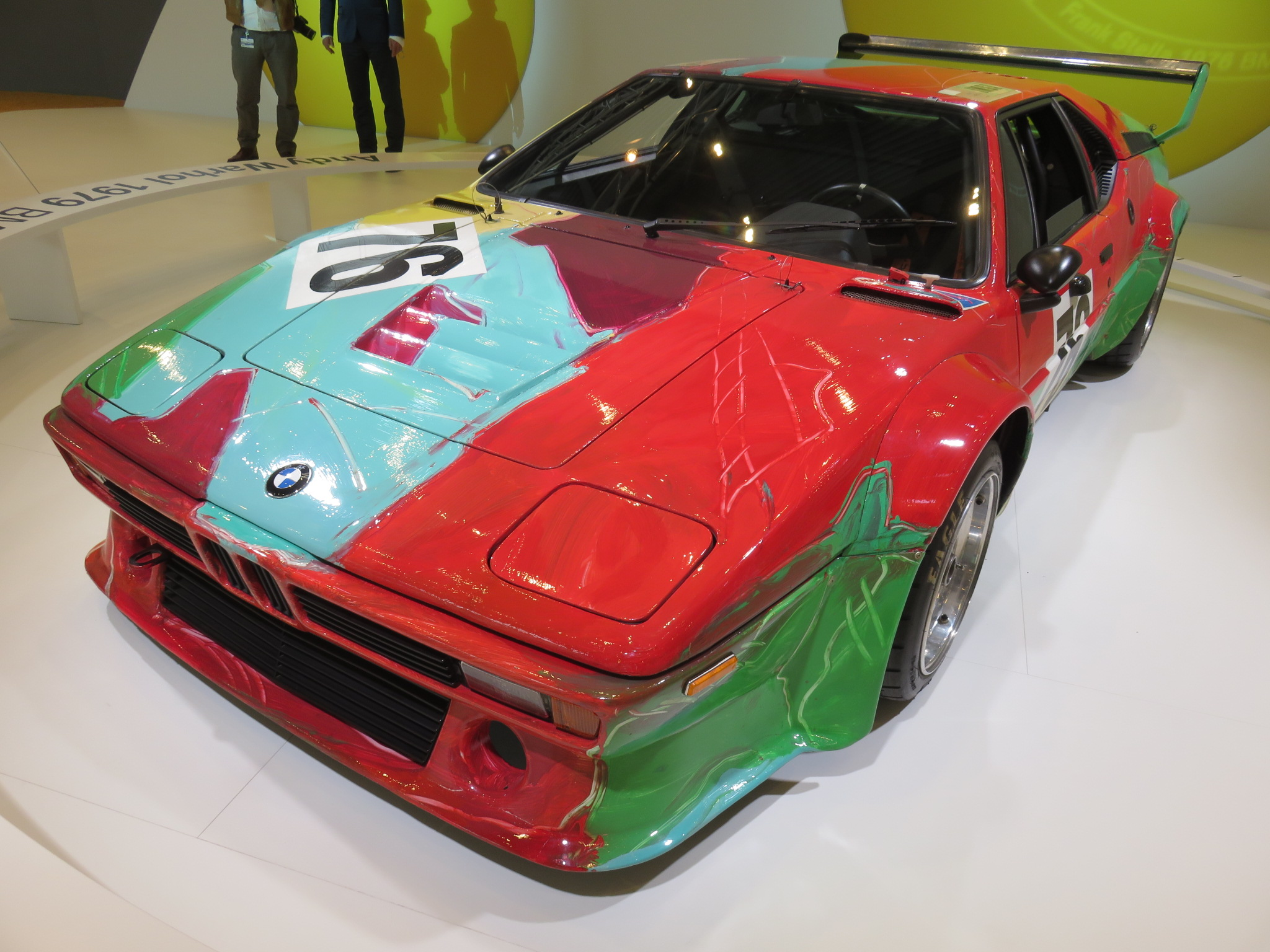 Concorso d'eleganza Villa d'Este 2015, BMW M1 Art Car by Andy Warhol